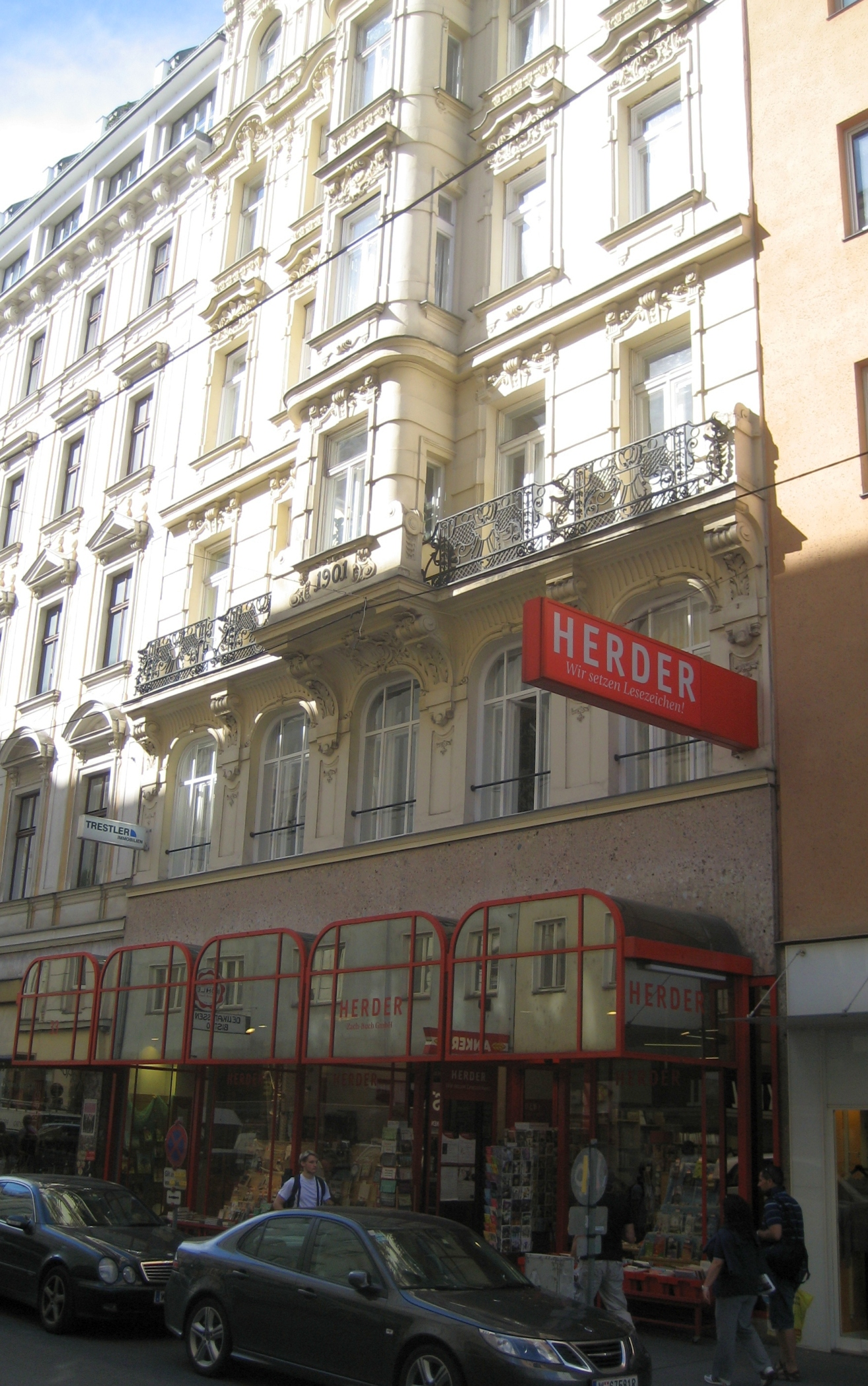 das Haus Wollzeile 33 im 1. Bezirk, in Wien